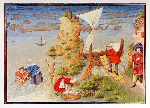 Miniatura che illustra la novella di Landolfo Rufolo (Decameron, II, 4), realizzata da artisti fiamminghi per un'edizione francese del Decameron